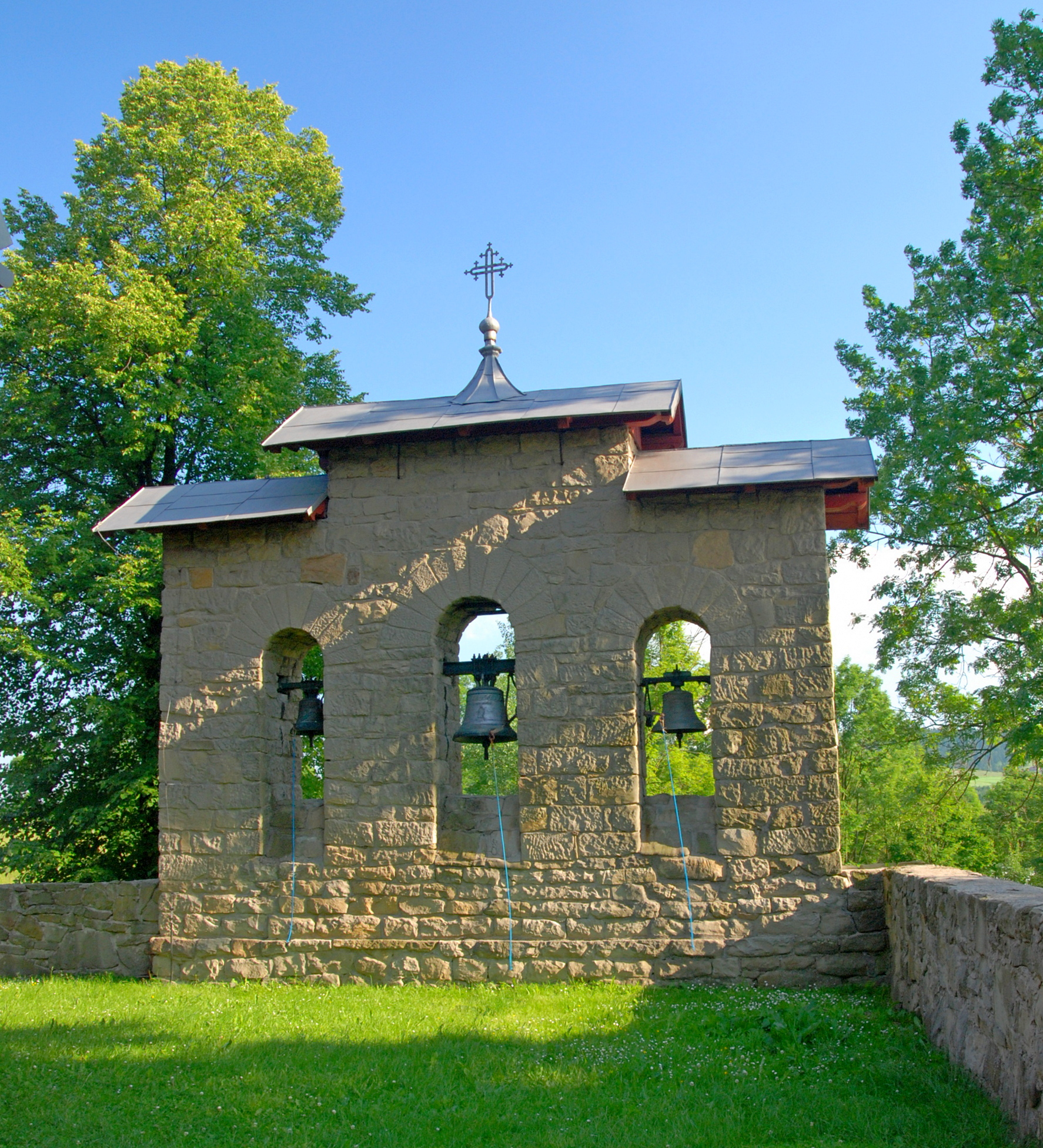 wieś Czyrna